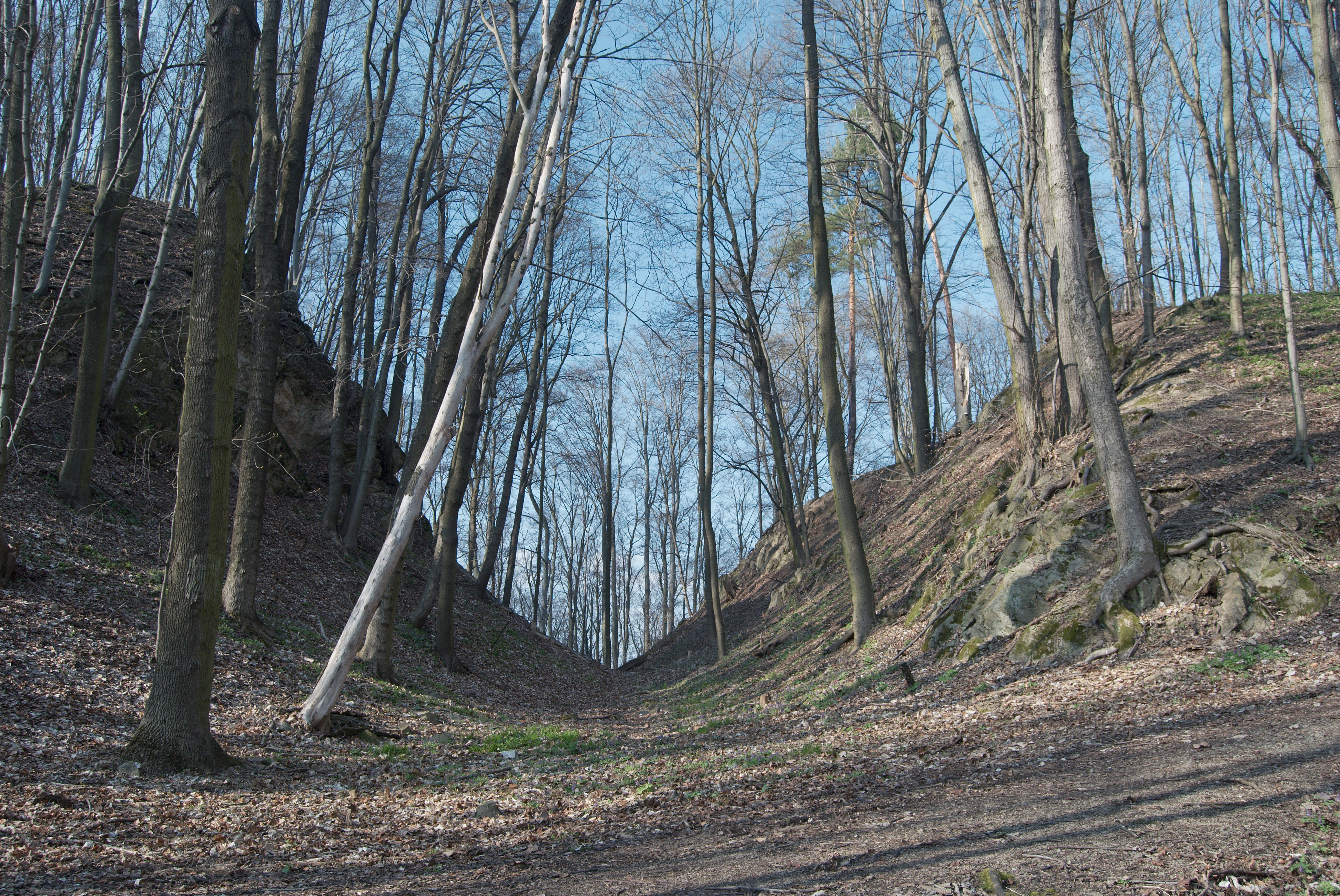 Česky: Šíjový příkop Starého hradu u Adamova